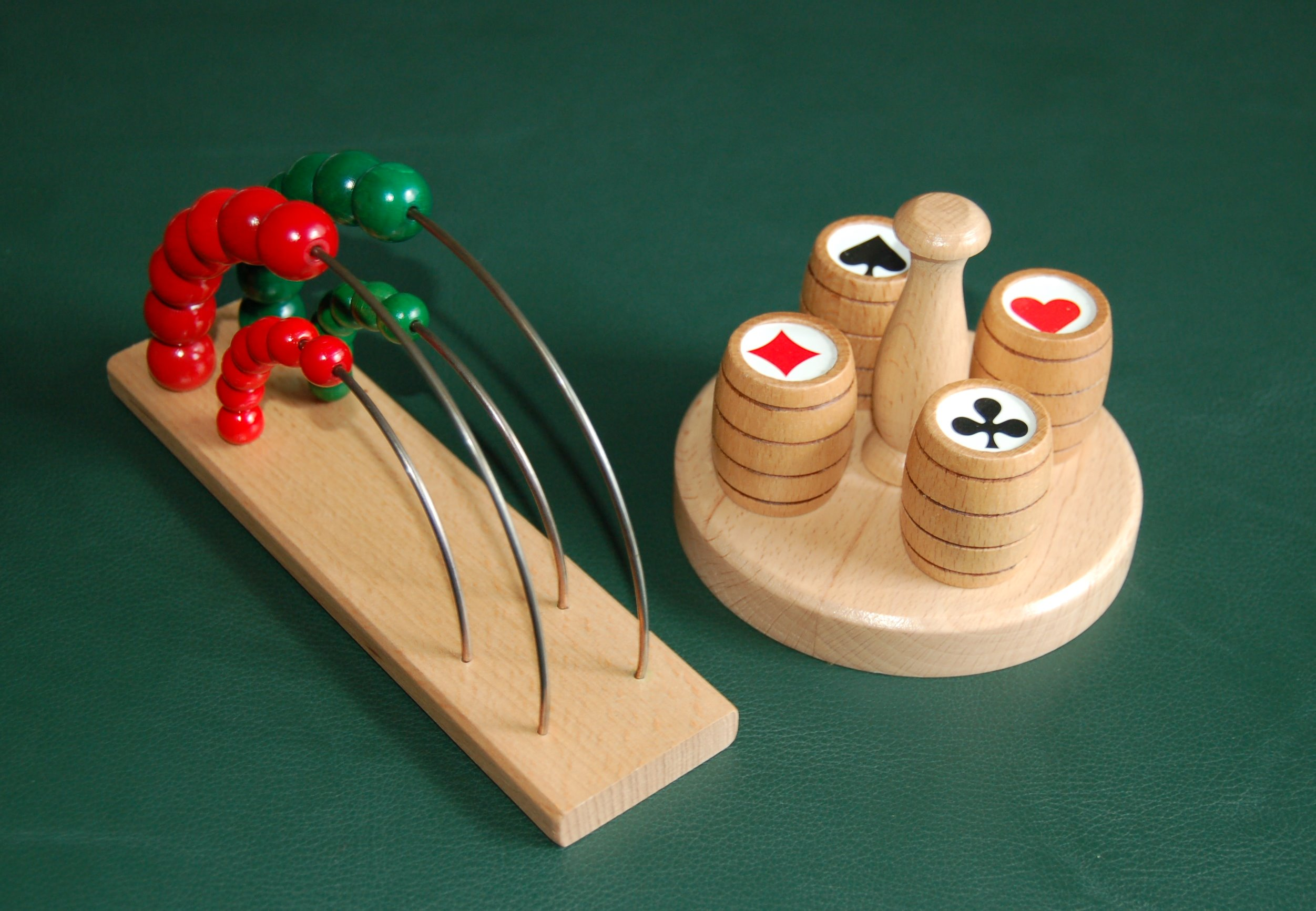 Bummerlzähler und Ansagefässchen für das Kartenspiel Schnapsen